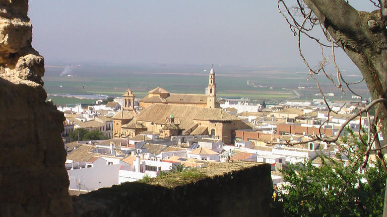 Osuña